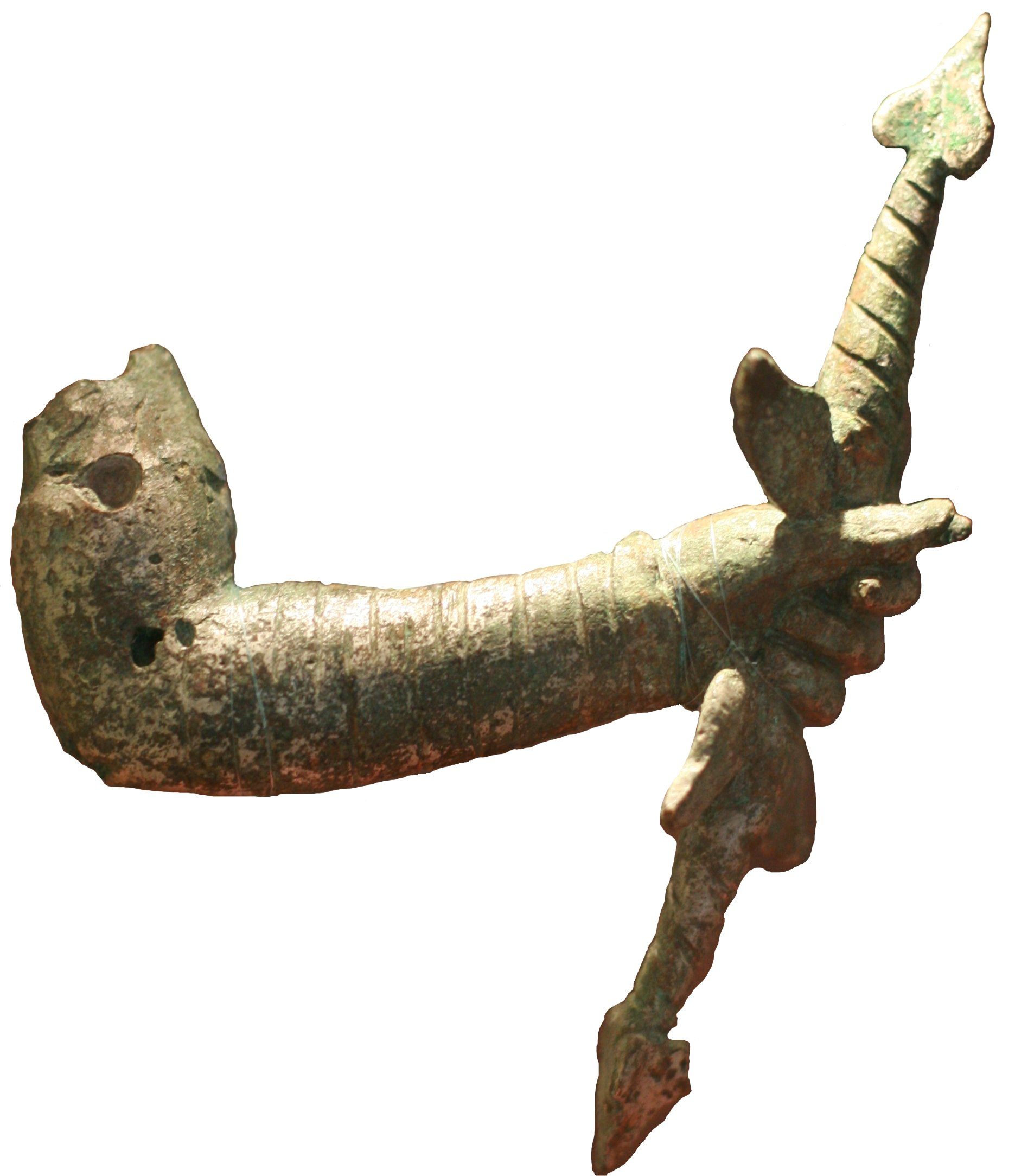 Linker Unterarm einer Bronzestatue des Jupiter Dolichenus. ca. 11 cm lan. 2.Jhdt., Museum Caruntum